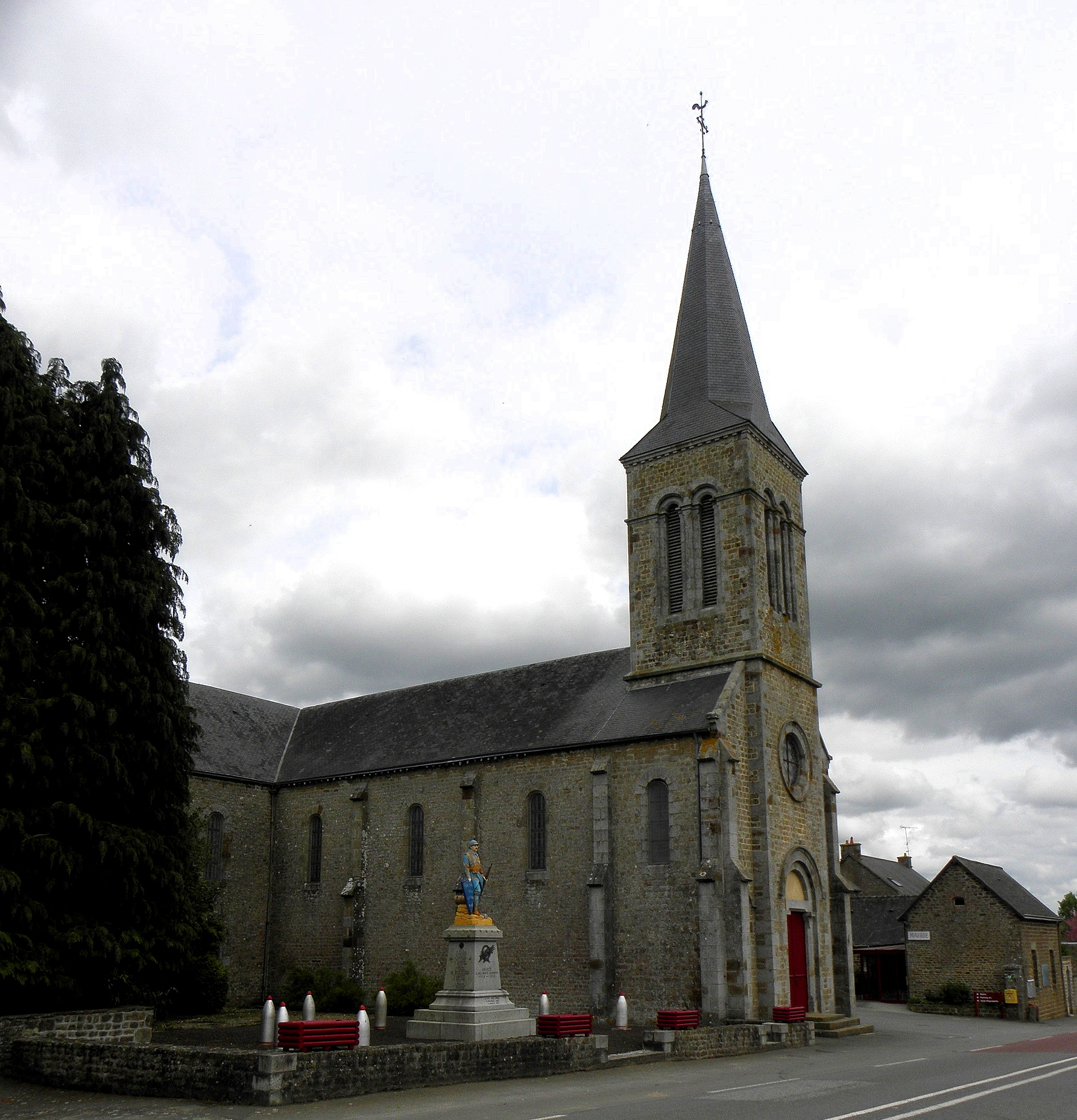 Église de l'Immaculée Conception de Hercé (53). façade principale et flanc ouest.